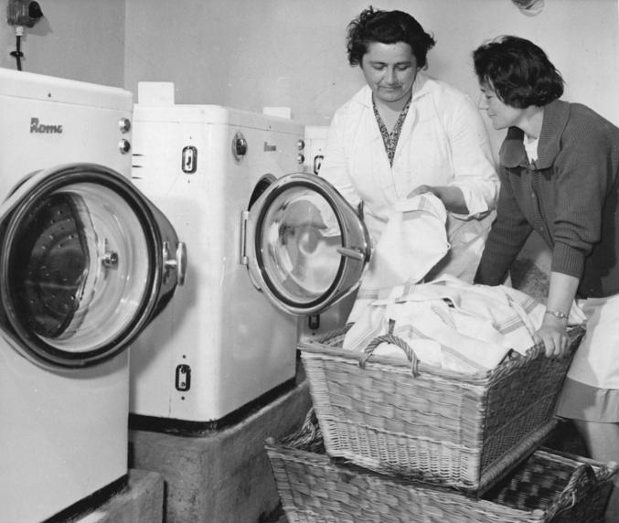 Steinhausen, Blick in die Dorfwäscherei Zentralbild Burmeister M-Qu 19.6.1962 Gemeinde Steinhausen - ein Beispiel für den steigenden Lebensstandard auf dem Lande. Ein Beispiel für den ständig steigenden Lebensstandard auch in den ländlichen Gemeinden der Republik liefert die Gemeinde Steinhausen im Kreise Wismar, die die Groß-LPG "Ernst Thälmann" mit 7 Ortsteilen umfasst. Ein Kulturhaus mit Kultursaal und den verschiedensten Zirkeln für eine sinnvolle Freizeitgestaltung, ein Wäschestützpunkt, eine Kinderkrippe, mehrere Kindergärten in einigen Ortsteilen, eine Dorfakademie und eine mehrere tausend Bände umfassende Bibliothek gehören zu der großen Anzahl der kulturellen und sozialen Einrichtungen dieser Gemeinde. Auch an der ständig steigenden Zahl der Fernsehgeräte, Motorräder, Autos und Mopeds lässt sich der Reichturm der Genossenschaftsbauern messen. 22 PKW, 77 Motorräder und Mopeds sowie 81 Fernsehgeräte sind gegenwärtig in der Gemeinde registriert. UBz: Eine besondere Freude der Frauen der Gemeinde Steinhausen ist ihr Waschstützpunkt. Im November 1961 vom Konsumverband Kirchdorf-Steinhausen an die Frauen übergeben, ist es heute anziehungspunkt auch für die Frauen aus den Nachbargemeinden, die im Moment noch nicht über eine derartige Einrichtung verfügen. Vier Waschmaschinen mit Trockenschleudern zu je vier Kilogramm bedient Frau Henny Henning (links) 5 x täglich. Rechts Erika Glas aus Steinhausen.